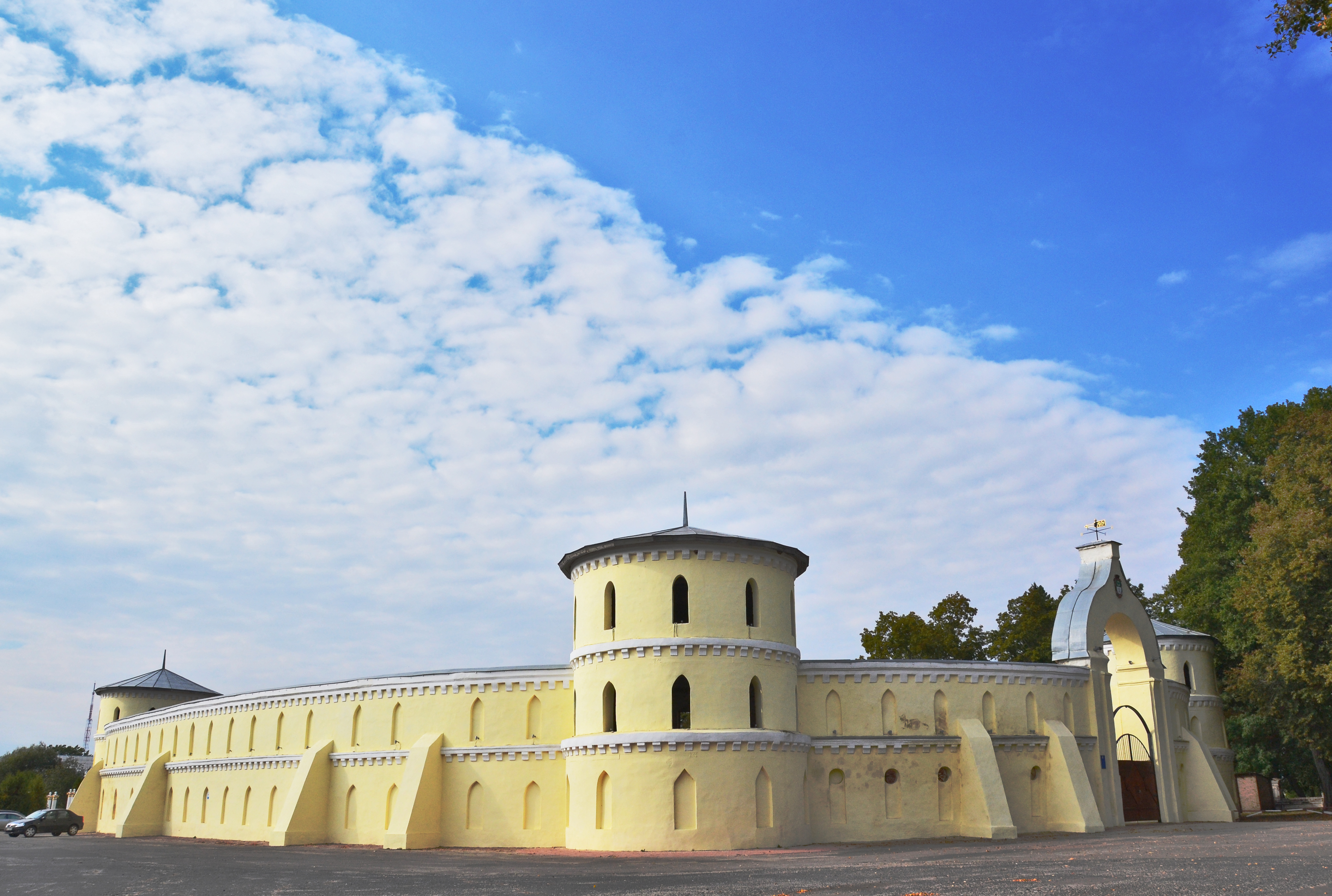 Круглий двір (мур.), Тростянець, вул. Миру, 20